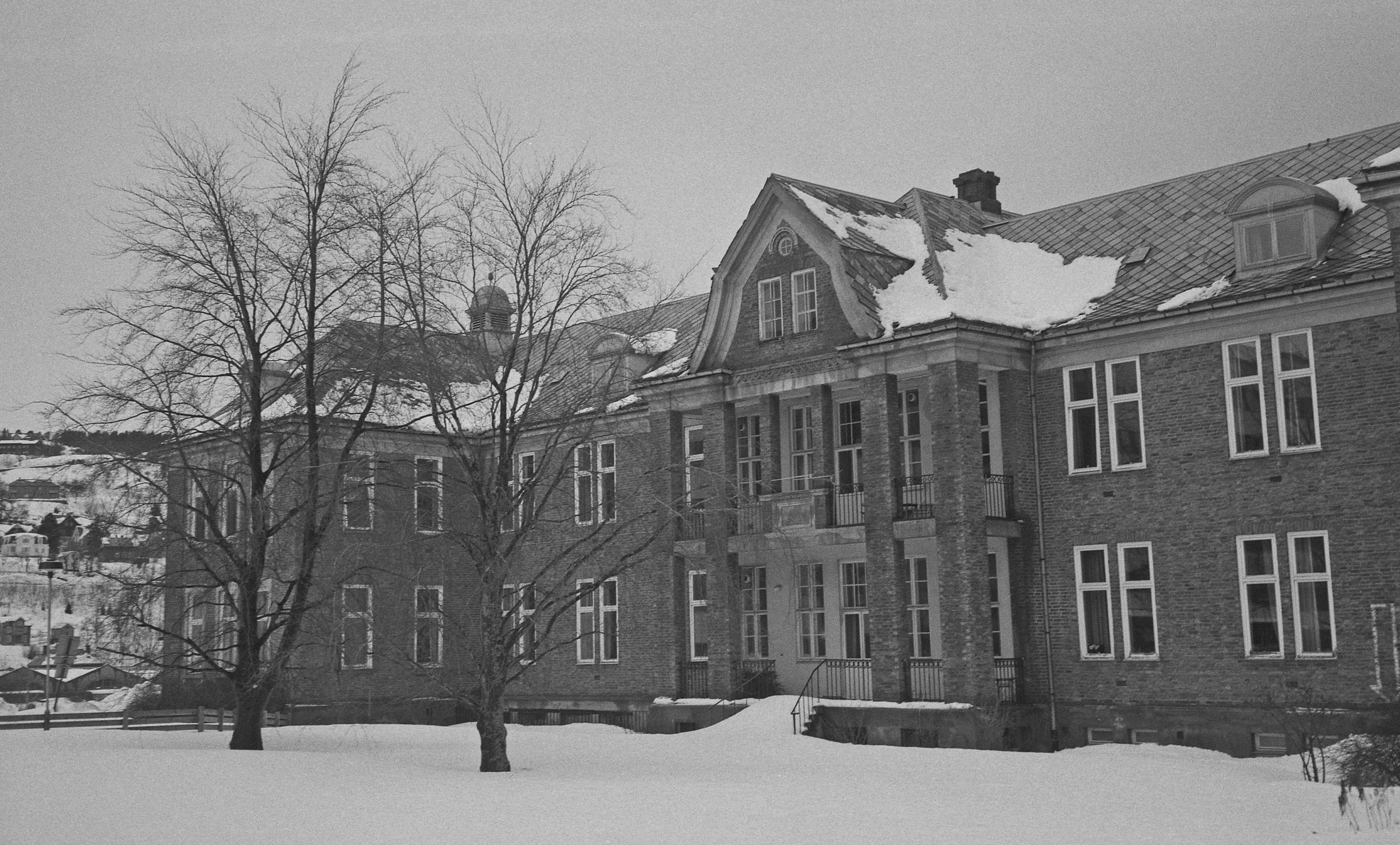 1902-bygget er det opprinnelige Trondhjems Sykehus. Arkitekt for det nye sykehuset var Karl Norum, også kjent for viktige bygg som Britannia Hotell, Mathesongården og revyteateret Hjorten. Format: 35 mm sort/hvitt negativ Film: Kodak Safety Film 5062 Dato / Date: ca. 1981 Fotograf / Photographer: Ukjent Sted / Place: Trondheim Eier / Owner Institution: Trondheim byarkiv, The Municipal Archives of Trondheim Arkivreferanse / Archive reference: Tor.H43.P1.F6068, film 42 Merknad: Fra Byantikvarens negativsamling.